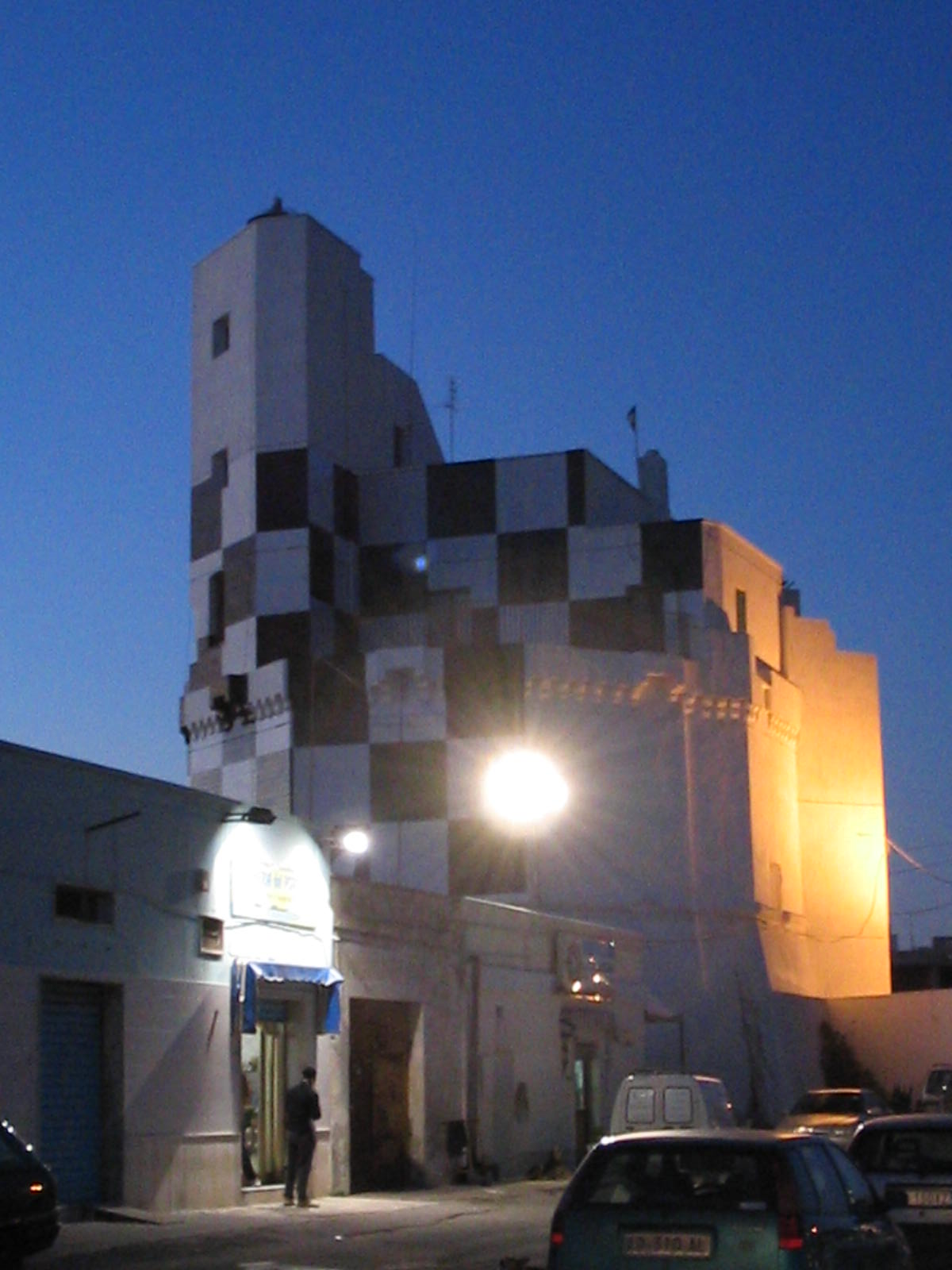 faro di Torre san Giovanni - Ugento